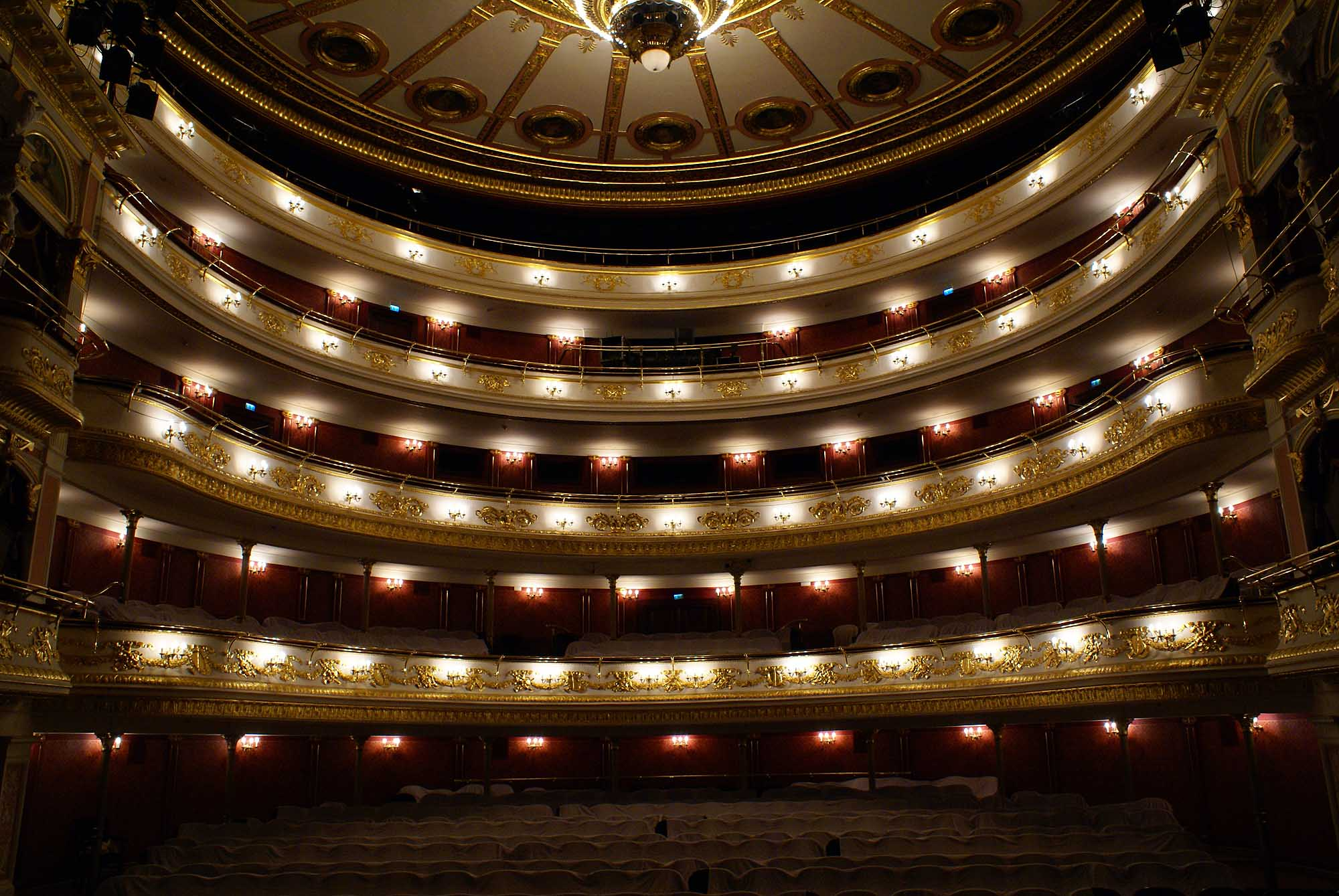 Wrocław, opera, 1837, 1871, 1955